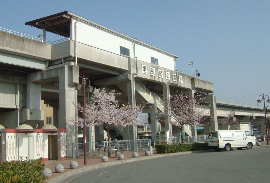 東海交通事業尾張星の宮駅